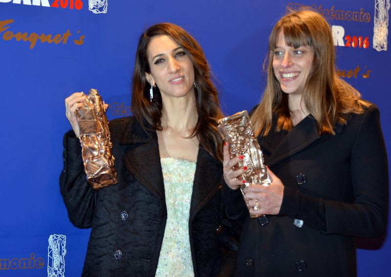 Deniz Gamze Ergüven et Alice Winocour à la cérémonie des César